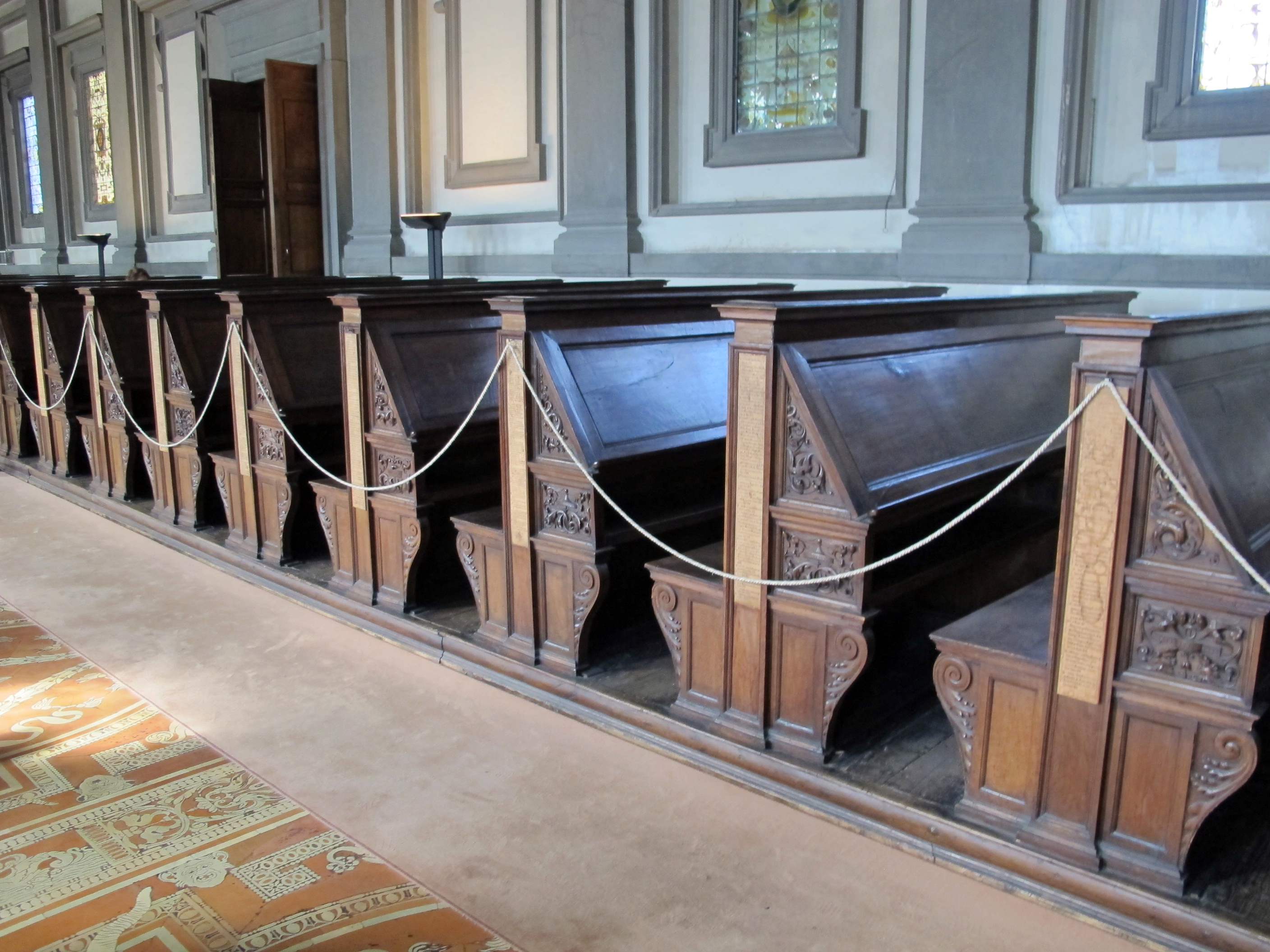 Biblioteca laurenziana, sala lettura, stalli michelangioleschi